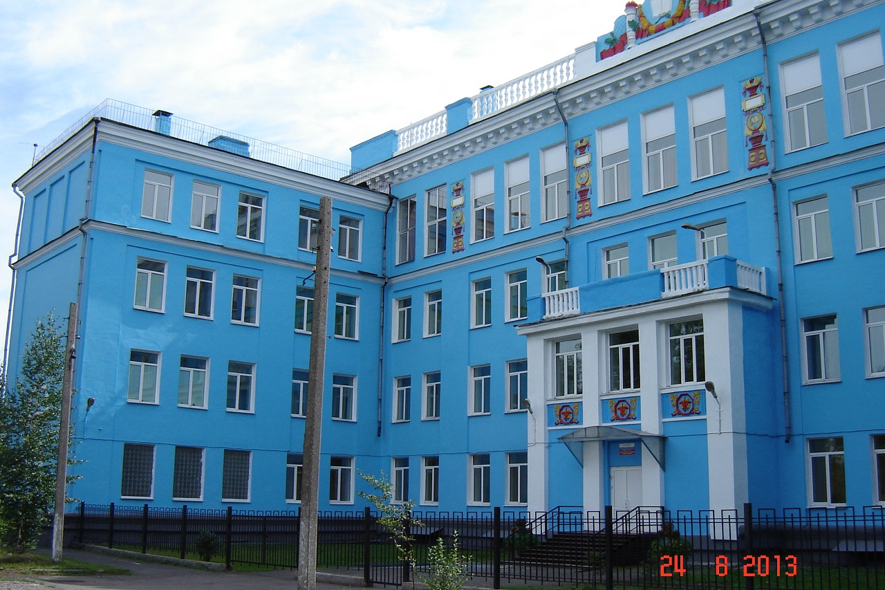 Бывшая Школа № 4 г. Черемхово (в настоящее время Муниципальное образовательное учреждение Черемховская коррекционная основная школа интернат)